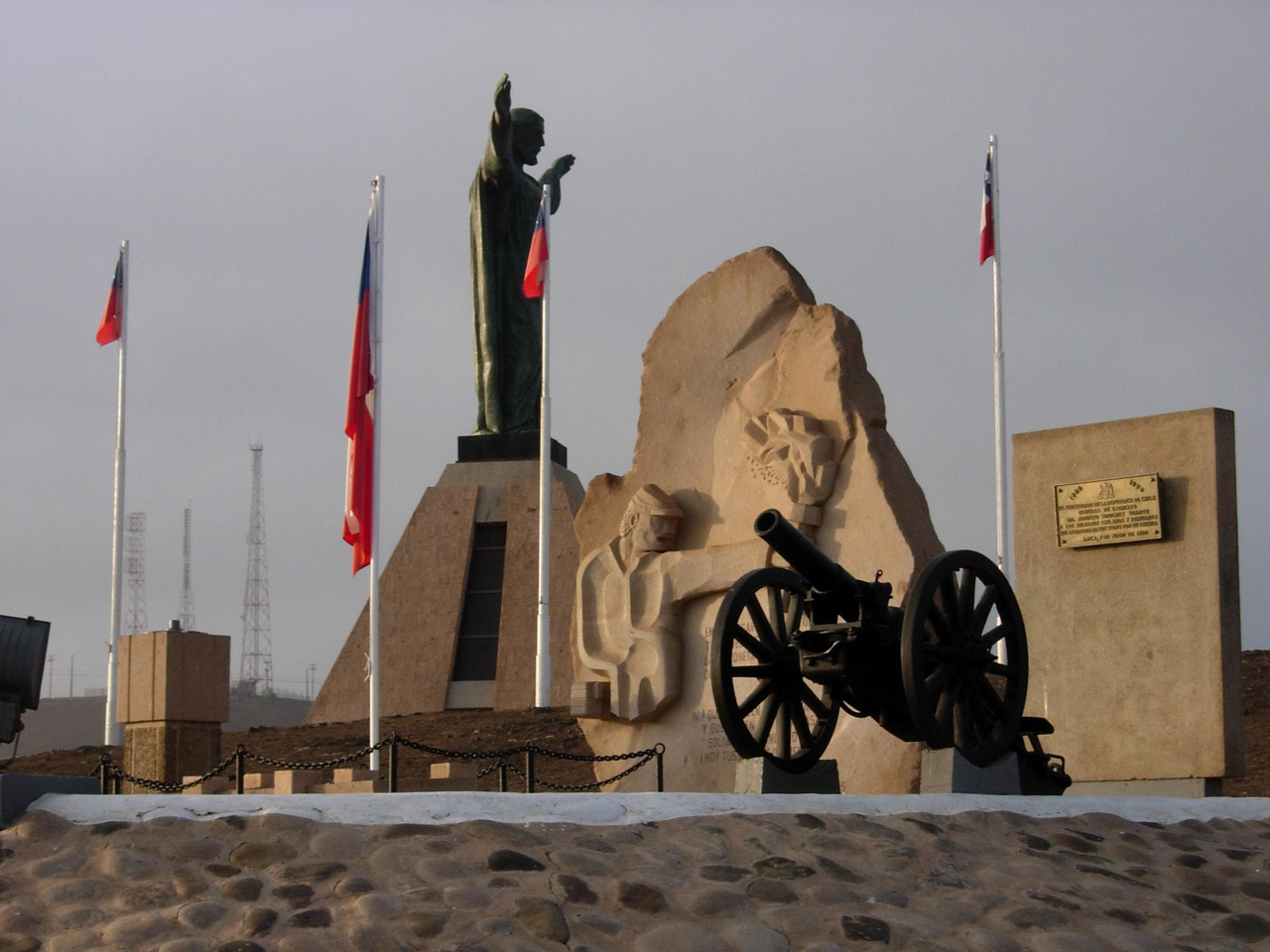 Diese Aufnahme zeigt das Denkmal über der Stadt Arica. (Selbst fotografiert)